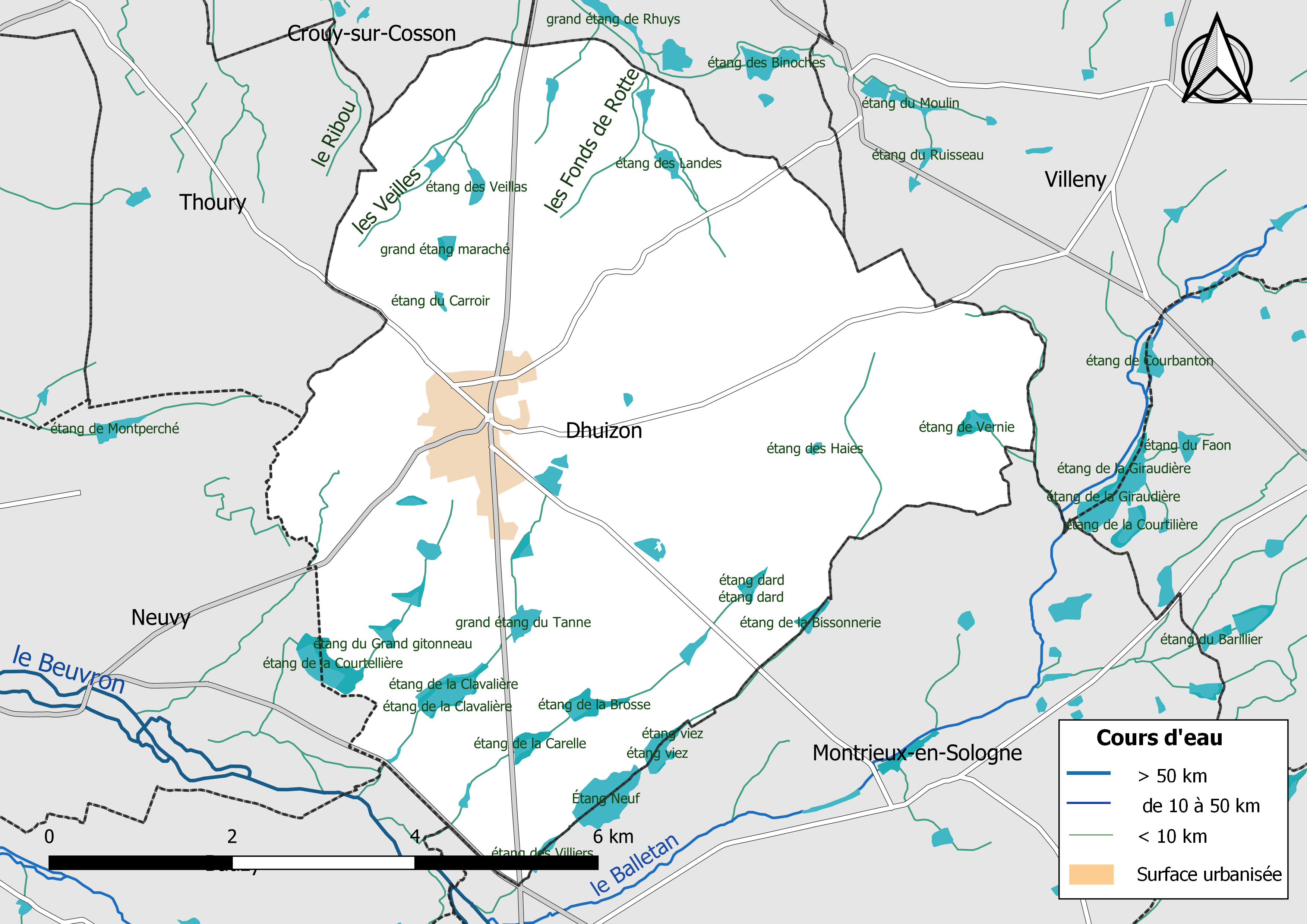 Carte du réseau hydrographique de la commune de Dhuizon (Loir-et-Cher, France).